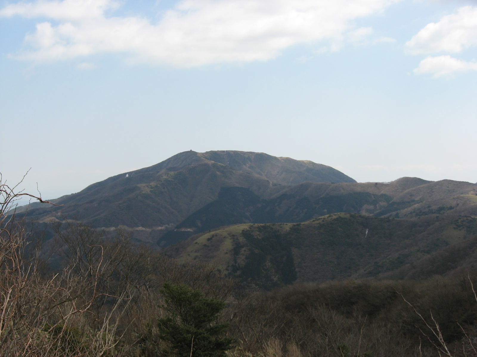 金時山付近から望む明神ヶ岳